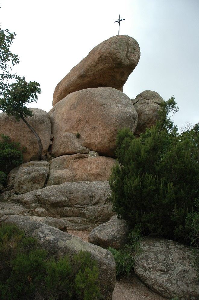 Pedralta, Sehenswürdigkeit in der Nähe von Sant Feliu de Guíxols. Ein großer Wackelstein aus Granit, wird als der größte europäische bezeichnet.